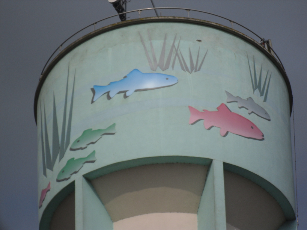 Détail de la fresque du château d'eau d'Acigné, Ille-et-Vilaine, Bretagne, France